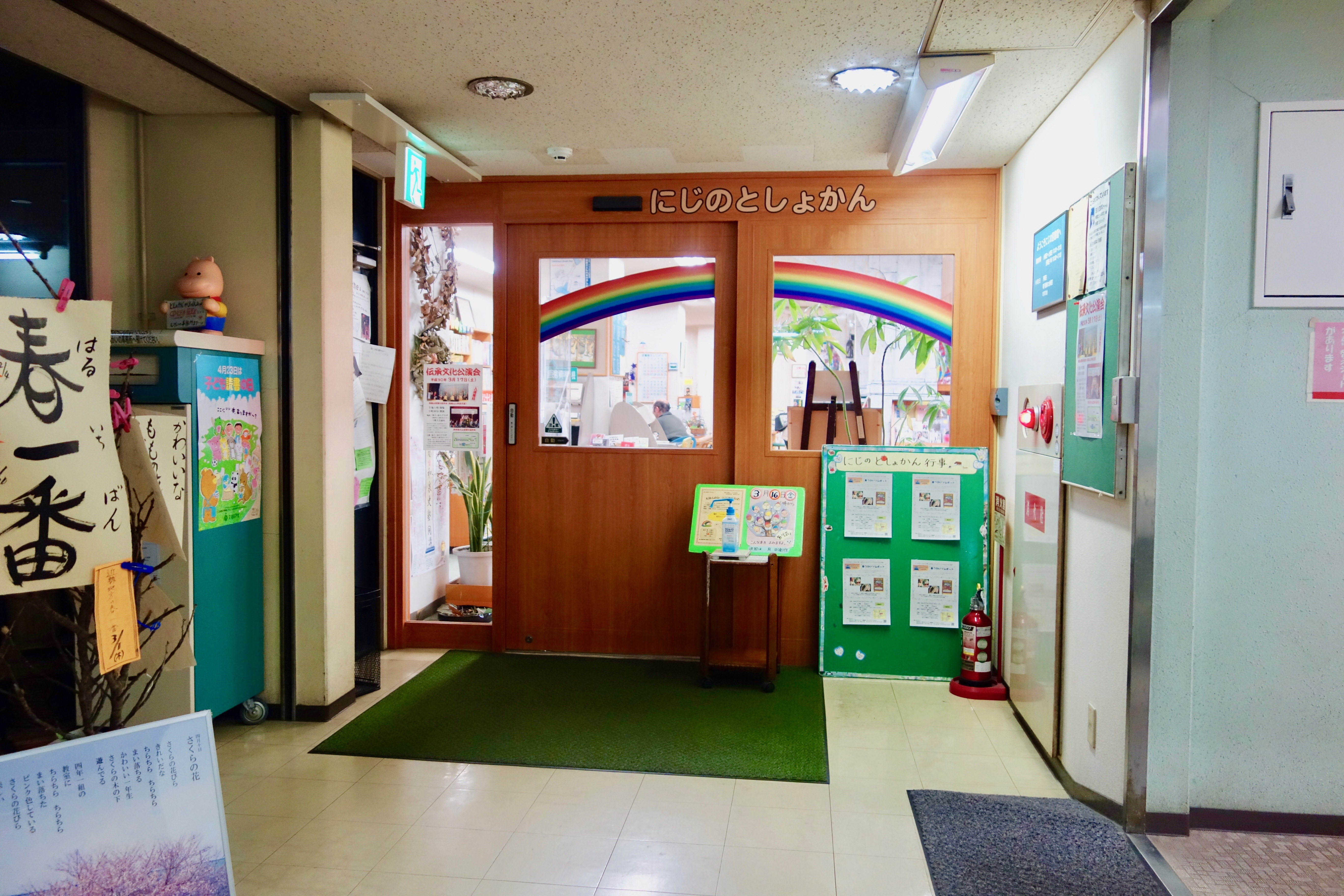 にじのとしょかん